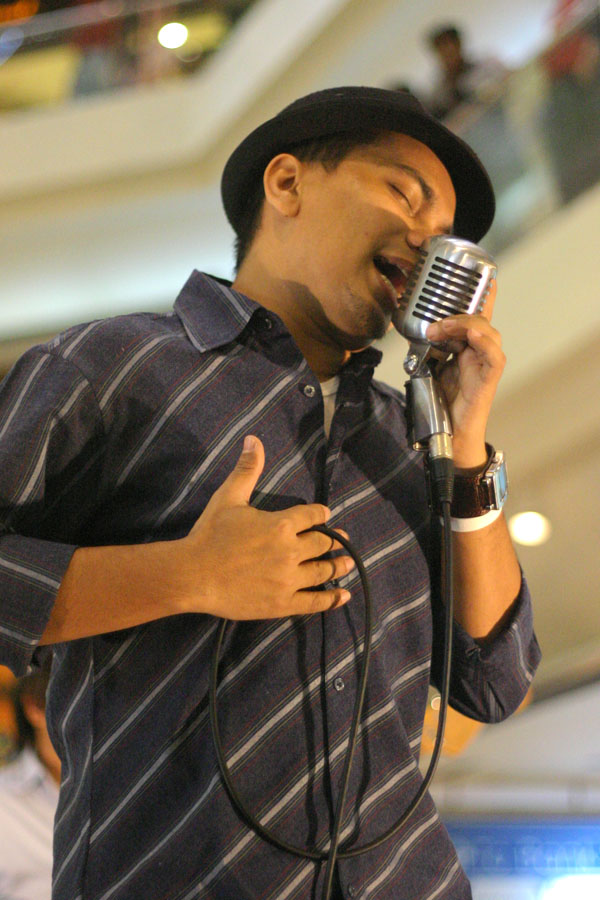 Teuku Adi Fitrian, Indonesian jazz singer